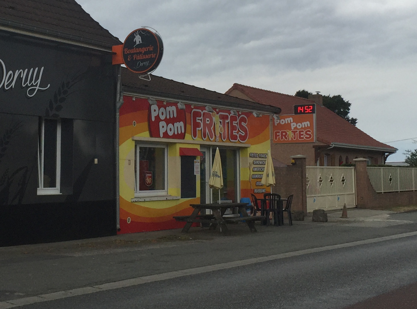 Een restaurant aan de voormalige Route Nationale 17 in Frankrijk